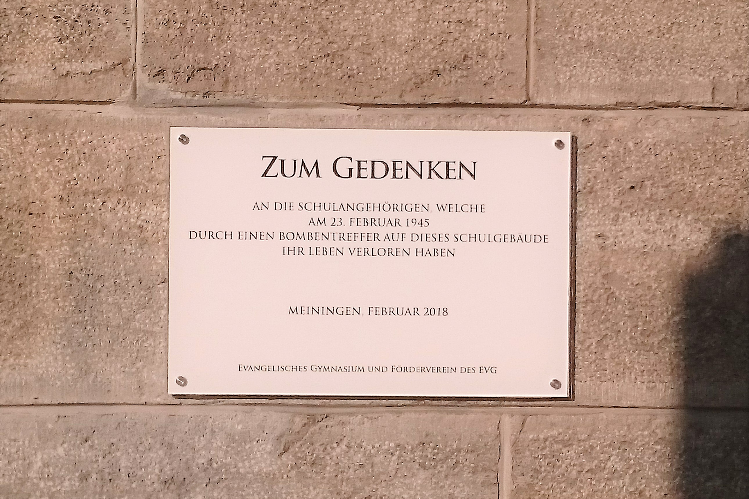 Gedenktafel für die Bombenopfer des Realgymnasiums von 1945 am heutigen Evangelischen Gymnasium Meiningen.